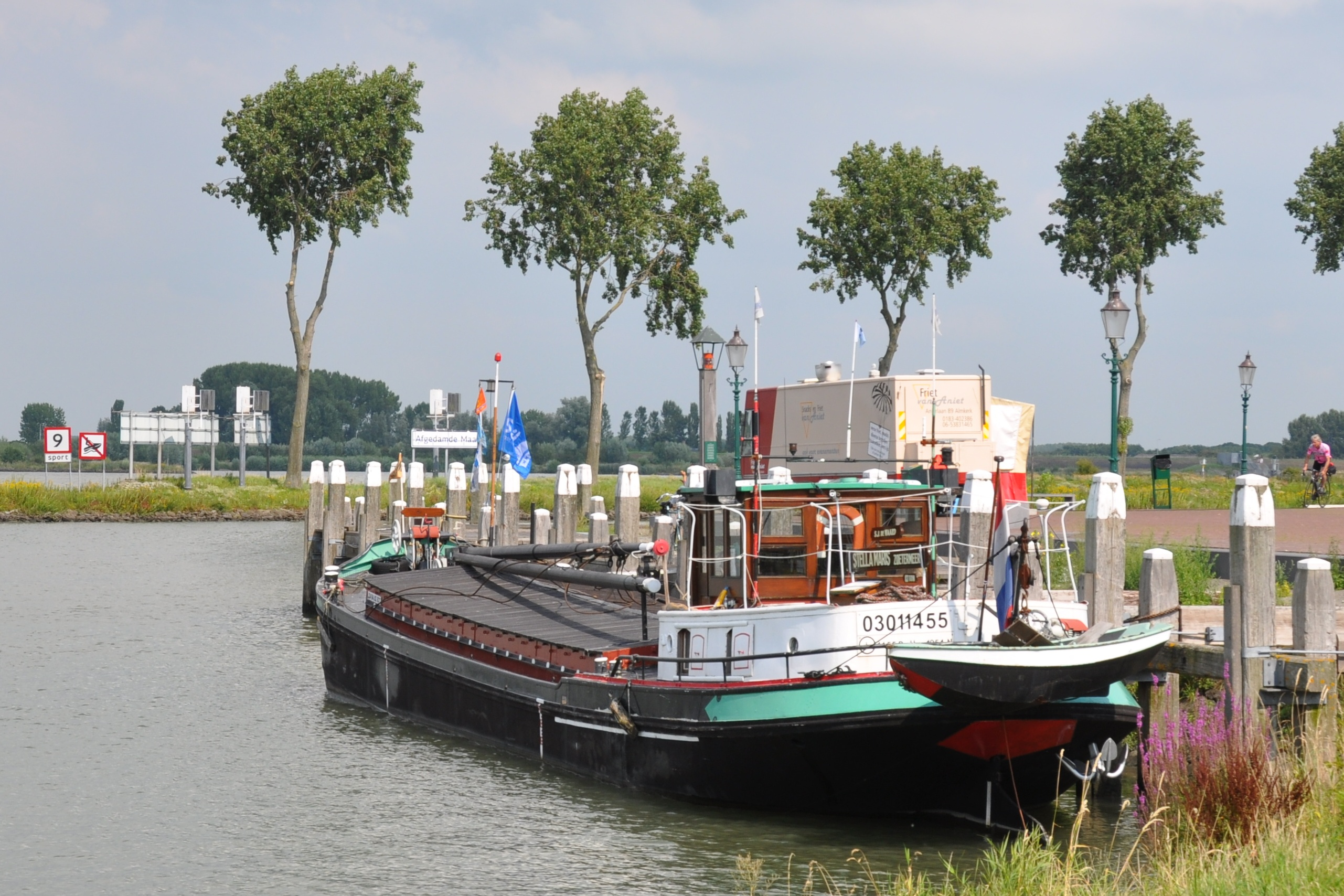 De STELLA MARIS voor de wal in Woudrichem.